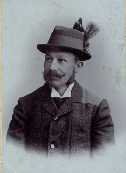 Chernel István, (Chernelházi) (Kőszeg, 1865. május 31. – Kőszeg, 1922. február 21.) magyar ornitológus.